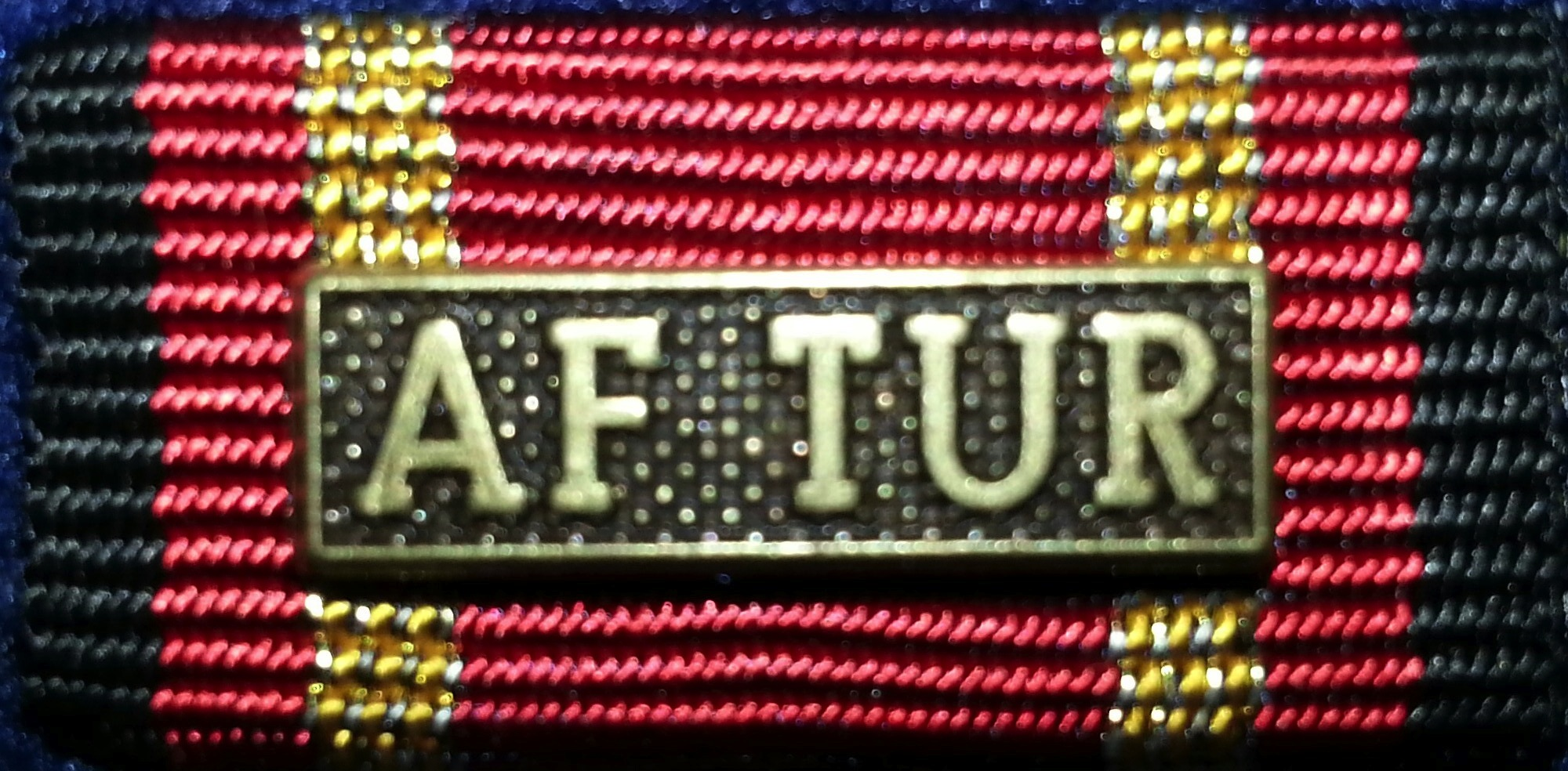 Bandschnalle: Einsatzmedaille der Bundeswehr (in Bronze) mit AF TUR spange.